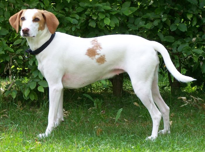 Istarski kratkodlaki gonič (Istrische kurzhaarige Bracke) Foto selbst gemacht